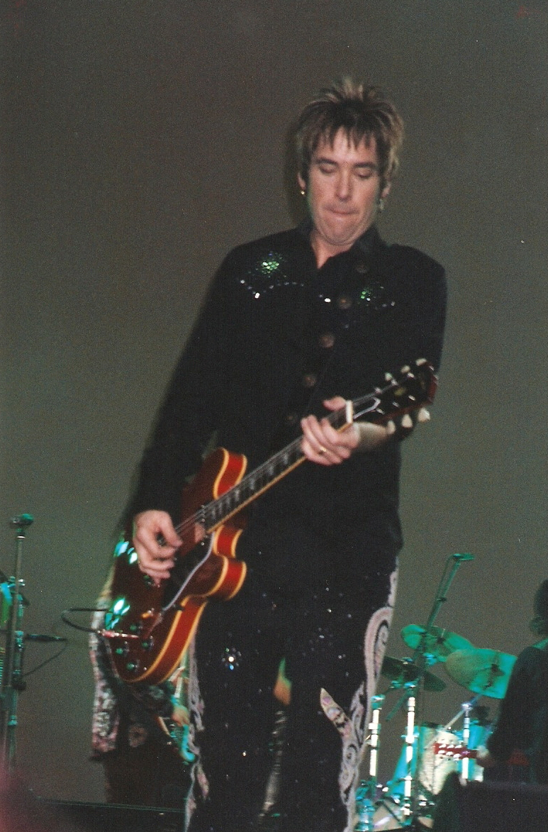 Concerto Roxette no Palau Sant Jordi, 24 de Outubro de 2001